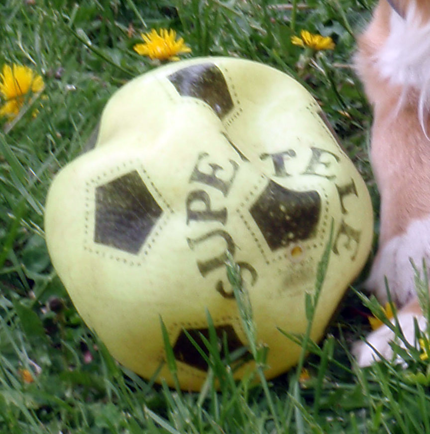 Super Tele -pallo.